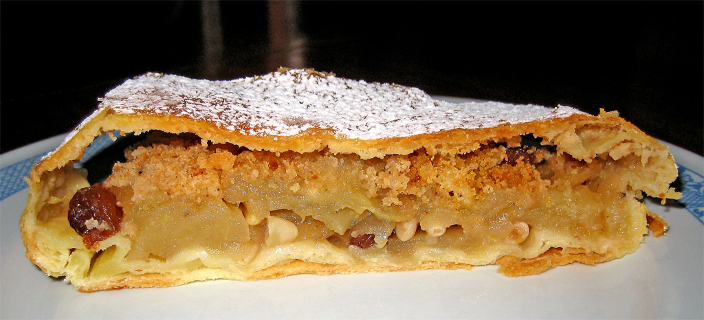 la fetta ricetta/recipe sul mio Blog